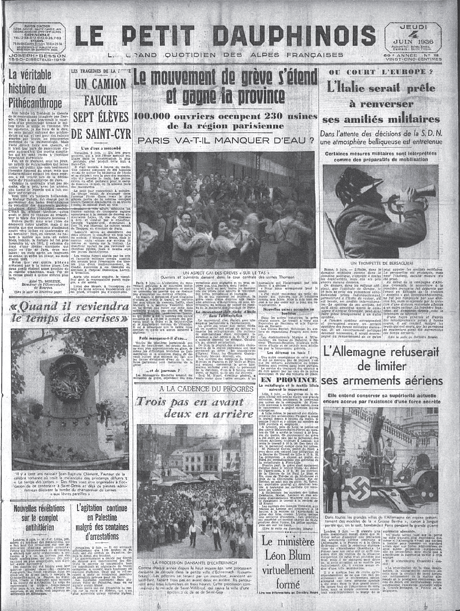 Quotidien Le petit dauphinois du 4 juin 1936. Départements : Ain, Isère, Savoie, Haute Savoie, Drôme, Ardèche